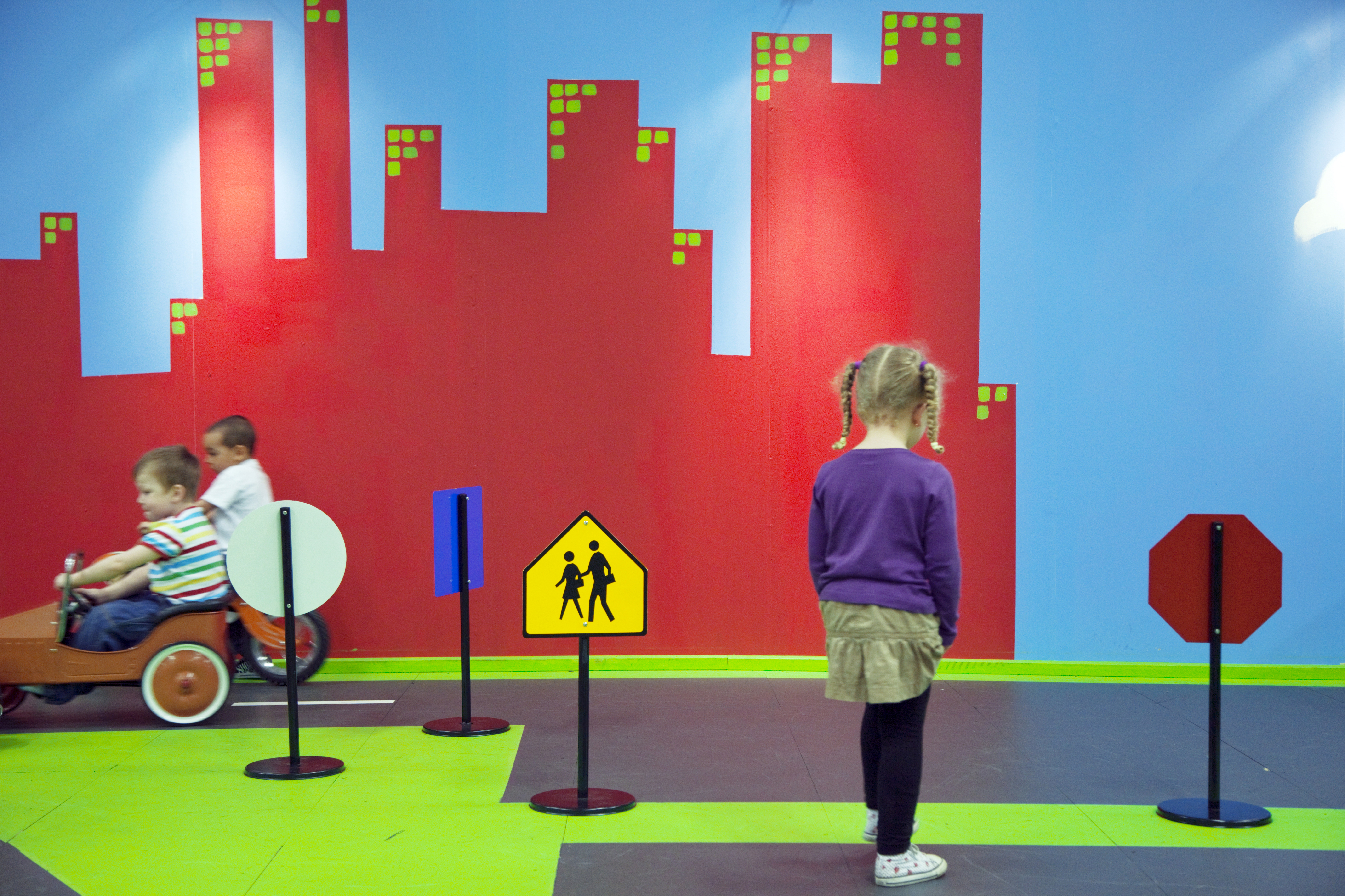 Barn i trafikken Keywords Children and Young Adults, Urban life, Sweden